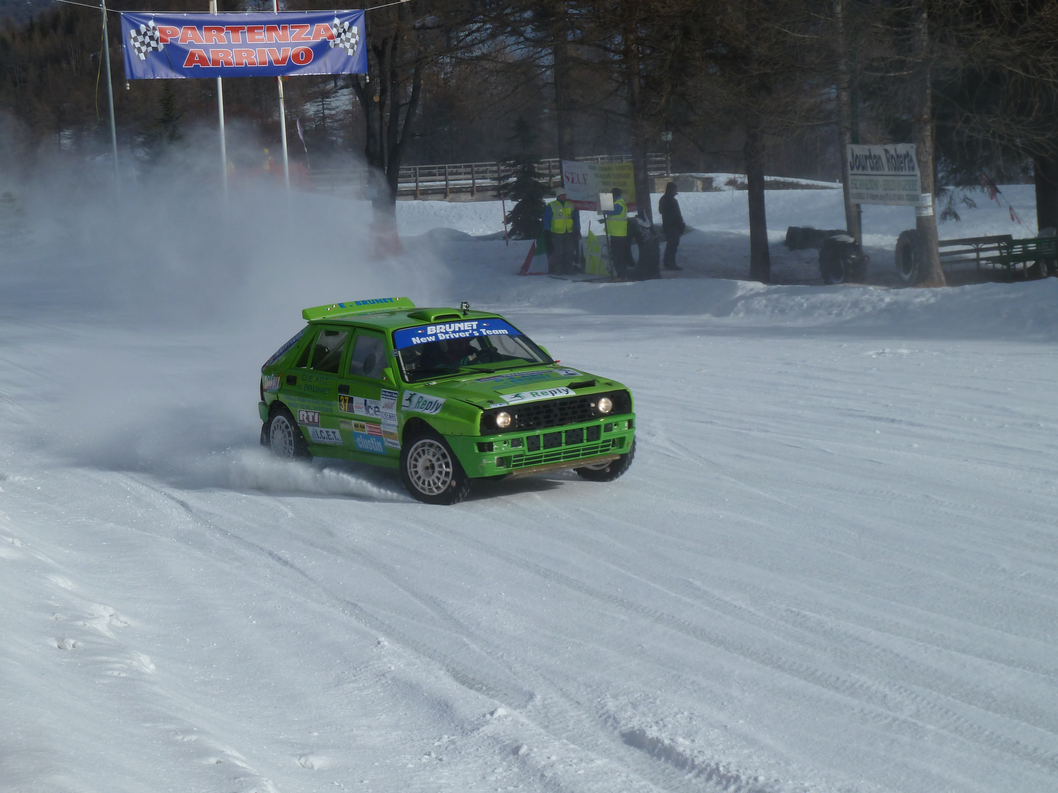 Lancia Delta Integrale on ICE Pragelato winter track